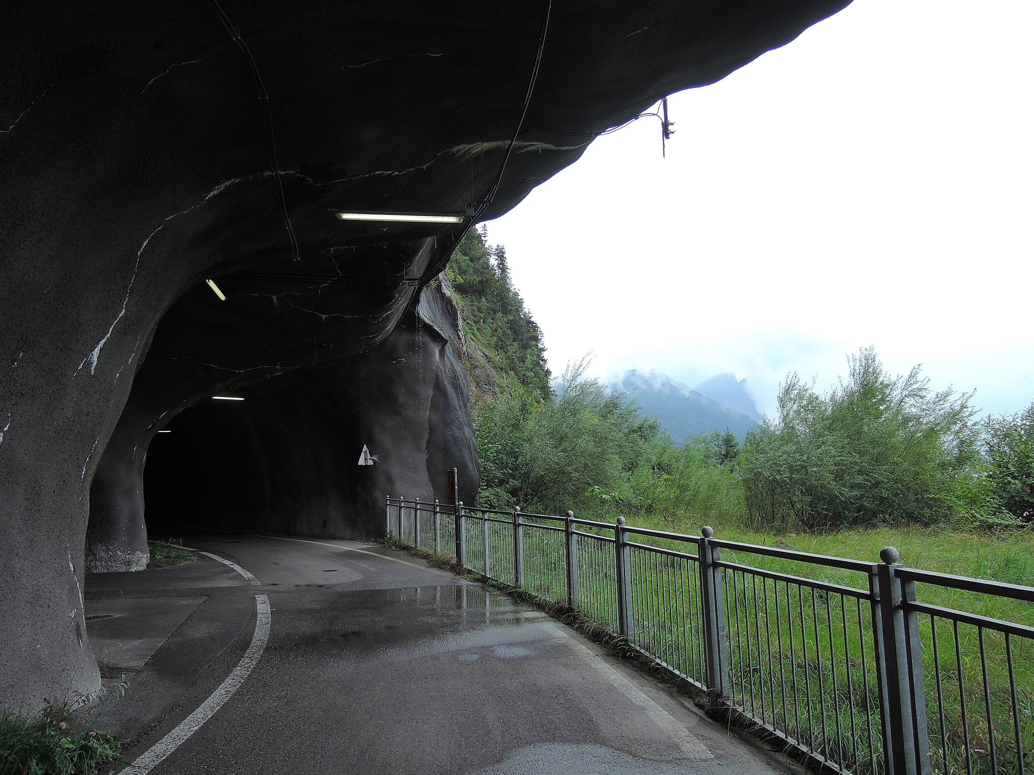 Gemeinde St. Gilgen, Austria, Mondseeufer